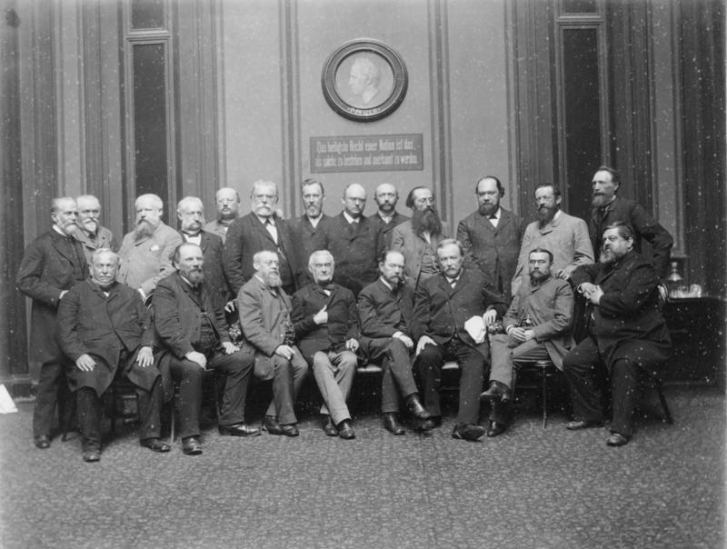 Title: Reichstag, Deutsche Freisinnige Gruppe Extra information: Mitglieder der Deutsch-Freisinnigen Partei unter Medaillon P. Pfizer und Inschrift "Das heiligste Recht einer Nation ist das, als solche zu bestehen und anerkannt zu werden."Aufnahme Aus Fotoalbum der "Deutsche Reichstag und sein Heim"Bild 116/121 People in the image: Nickel, Johann Heinrich (Reichstagsabgeordneter der Deutsch-Freisinnigen Partei), Deutschland (GND 133289958) Siemens, Carl-Friedrich von Dr. Ing. (MdR, Aufsichtsratsvorsitzender der Siemens & Halske und Schuckertwerke), Deutschland (GND 118765256) Factual corrections and alternative descriptions are encouraged separately from the original description. Additionally errors can be reported at this page to inform the Bundesarchiv. Original historic description: Deutsche Freisinnige Gruppe VI. Berling. Lüders. Schmieder. Klotz. Hoffmann.(Rudolstadt) Dr. v.Forckenbeck. Dr. Kohl. Dr. Meyer (Halle) Dr. Langerhans. Träger. Lerche. Dr. Witte Dr. Siemens. Munckel. Richter. Maager. Lorenzen. Schenck. Nickel. Schmidt (Eberf.) Broemel.